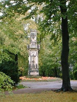 Freiberg Schwedendenkmal